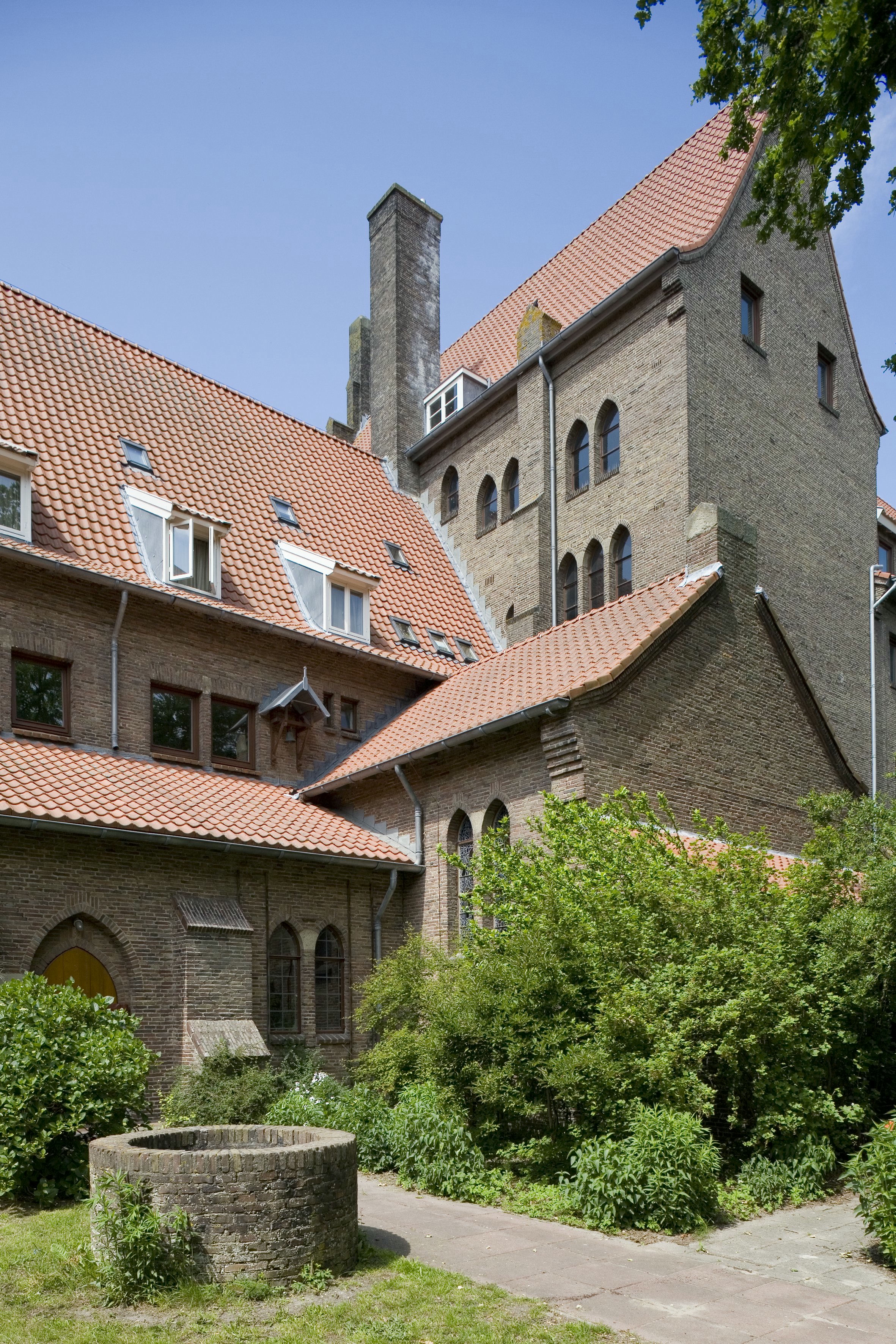 Sint Adelbertsabdij: Overzicht van de oostgevel